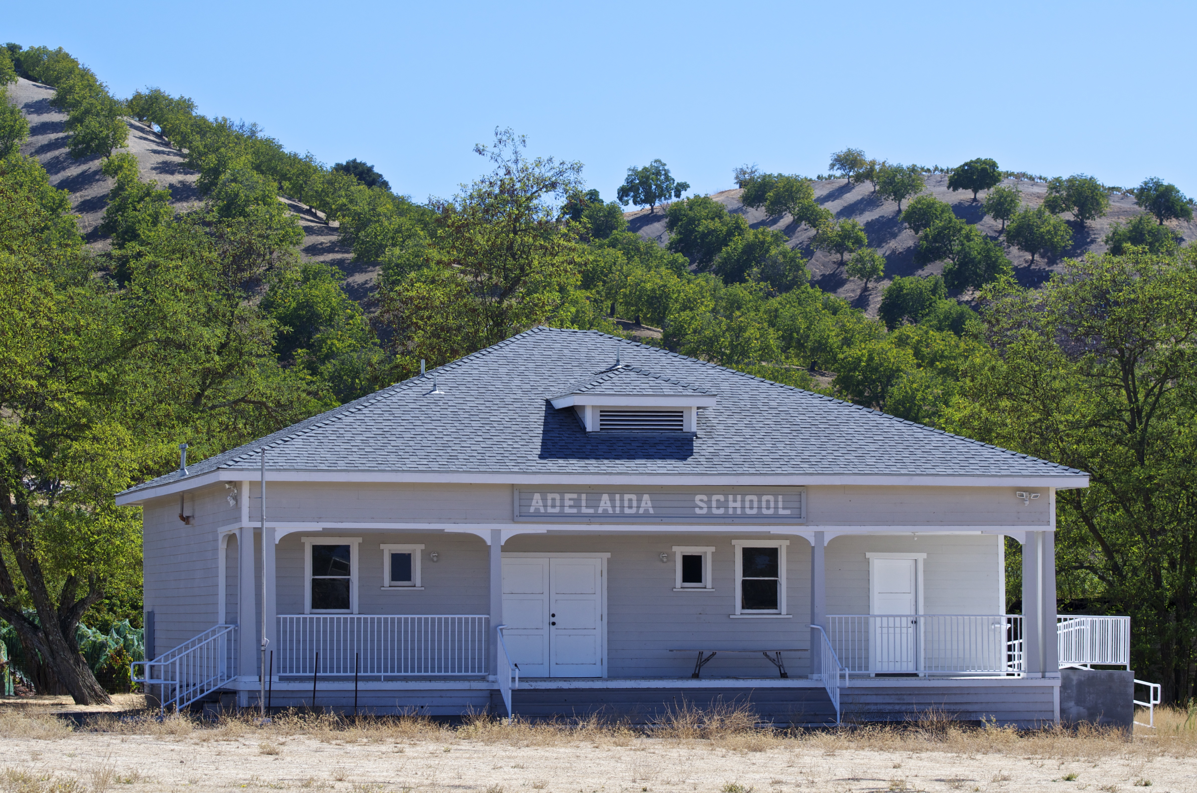 Adelaida School